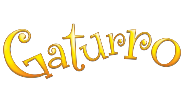 Gaturro